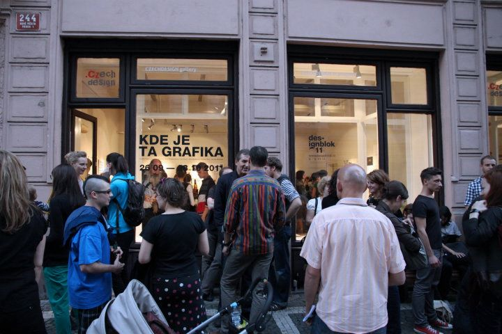 CZECHDESIGN